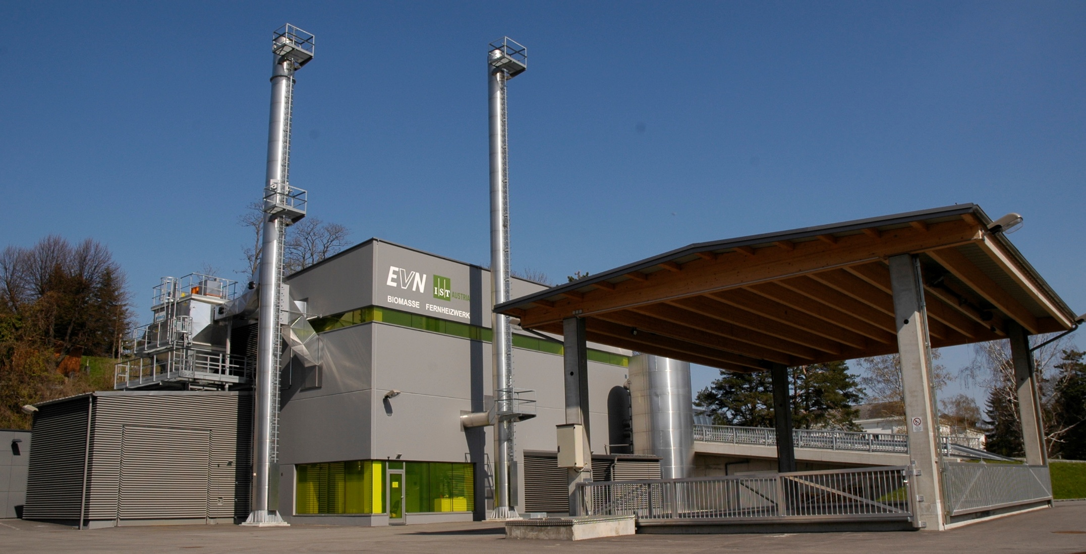 Biomasseheizwerk der Institute of Science and Technology Austria (IST Austria) in Maria Gugging; Betreiber und Errichter EVN Wärme